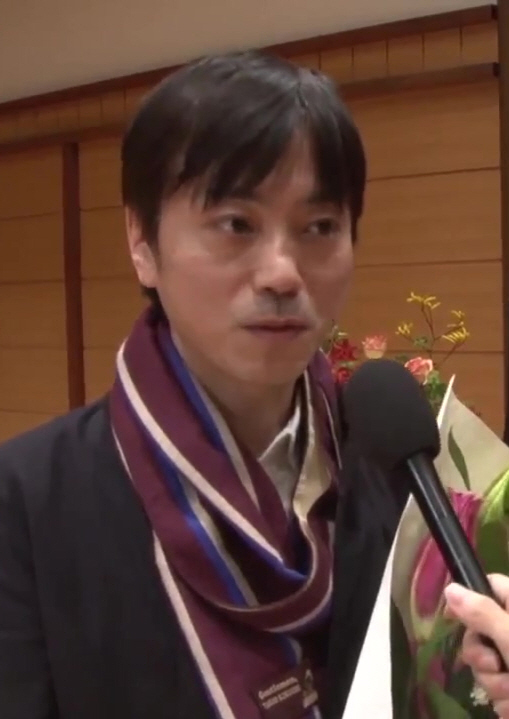 中村航さんトークショー〜人気作家が間近に！〜【2014年11月15日(土)取材】